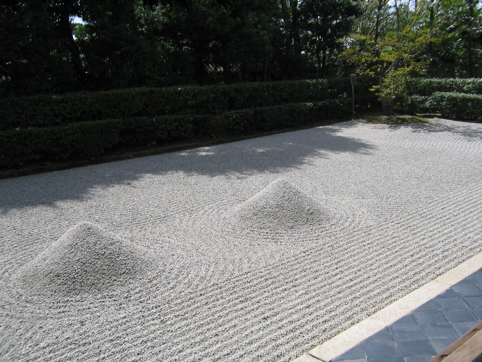 View of the daisen-in stone garden Nakaumi in Daitokuji.